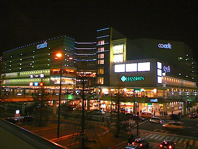 COCOE（プレオープン初日） 2009年10月14日撮影